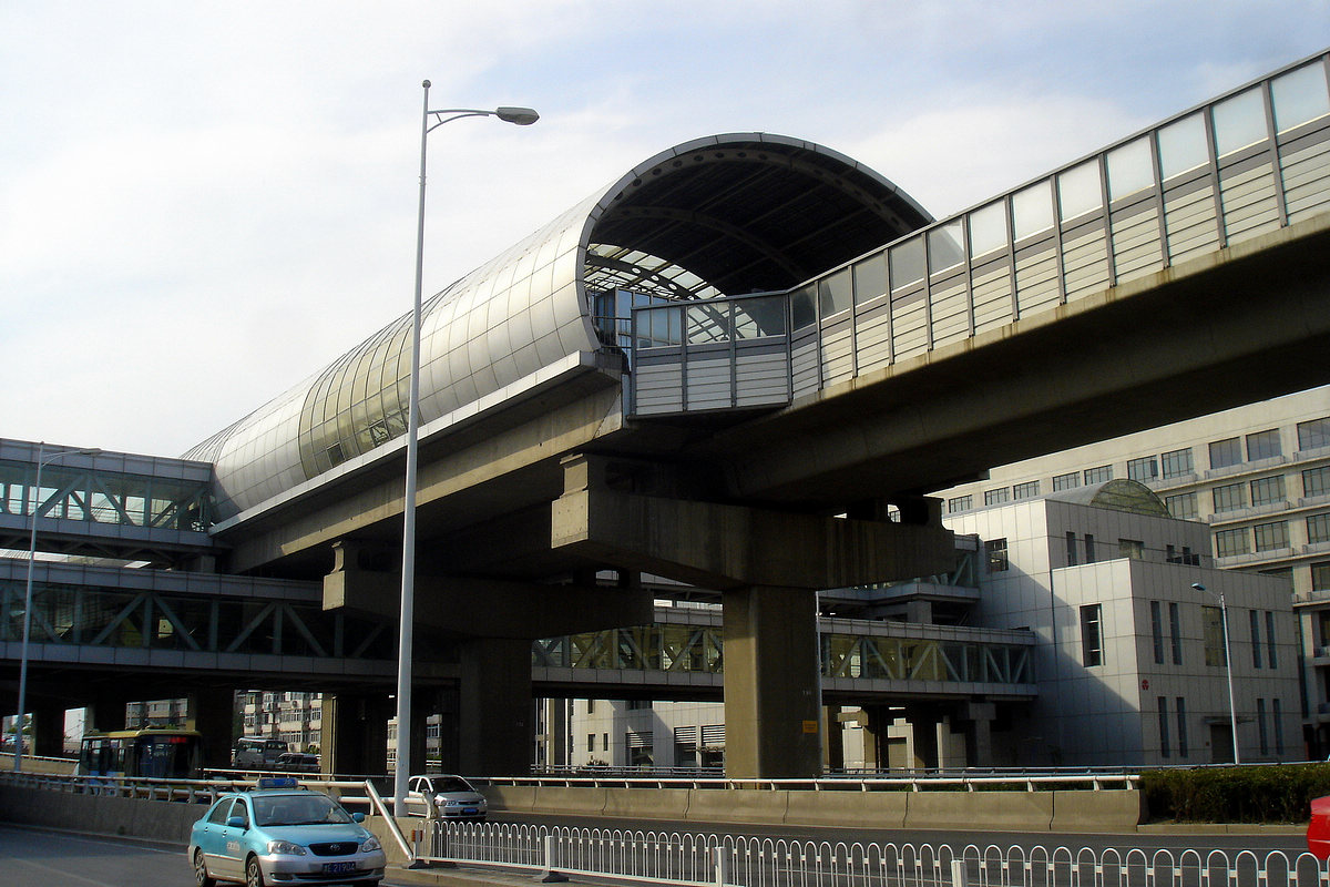 中文（中国大陆）: 复兴门站（地铁一号线）